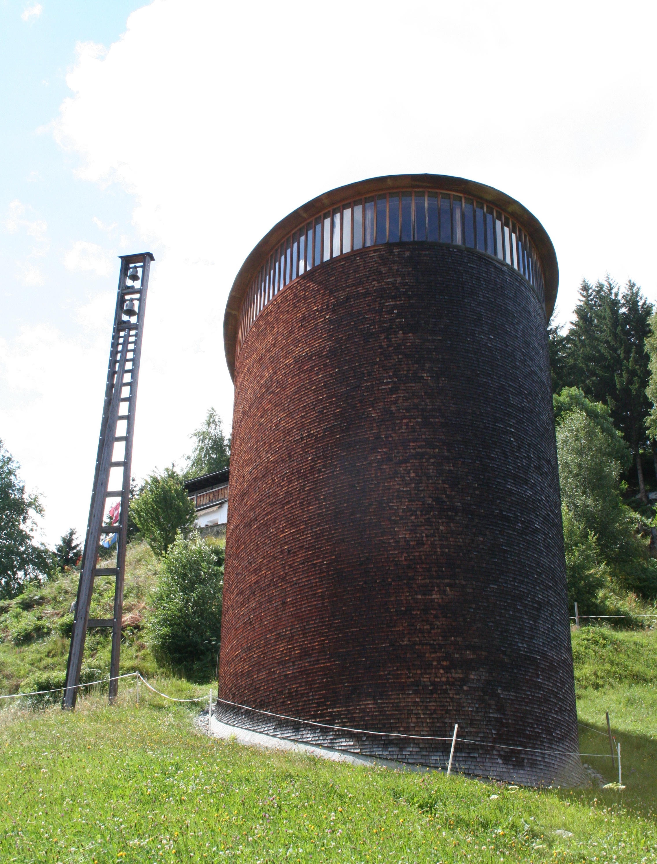 Kirche Sogn Benedetg oberhalb Sumvitg